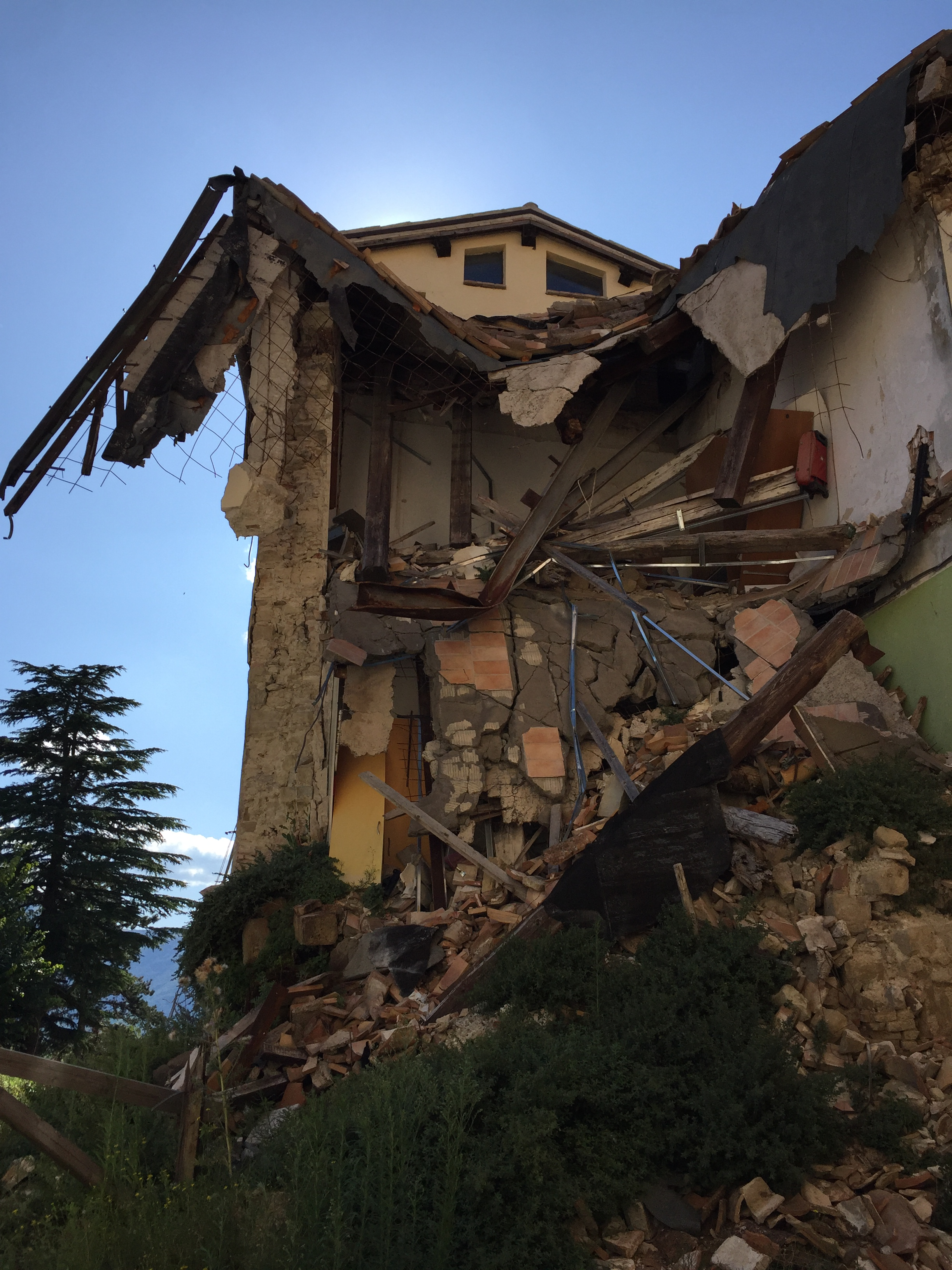 Maison encore visible à l'extérieur du centre-ville qui a été fermé à la population (Camerino - Août 2019)